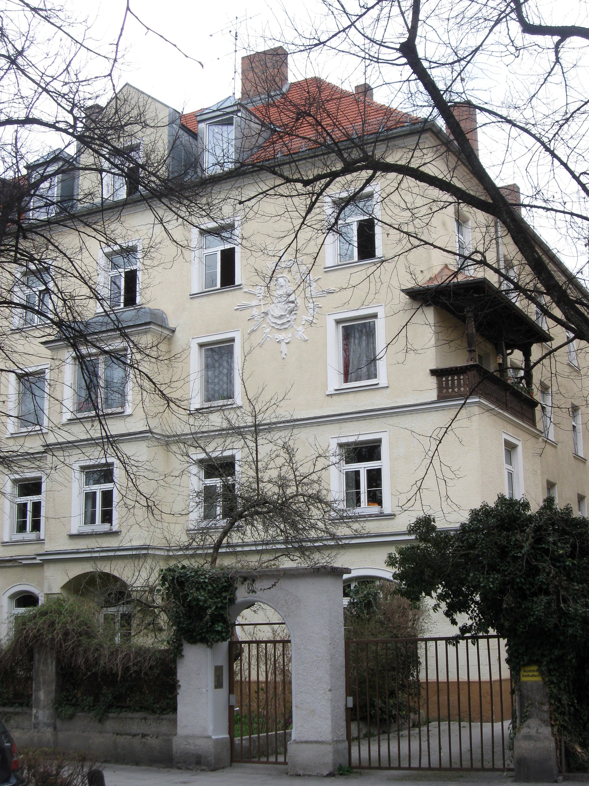 Adalbertstraße 90; Mietshaus, deutsche Renaissance, mit Holzloggia und Muttergottes-Stuckrelief, um 1900.